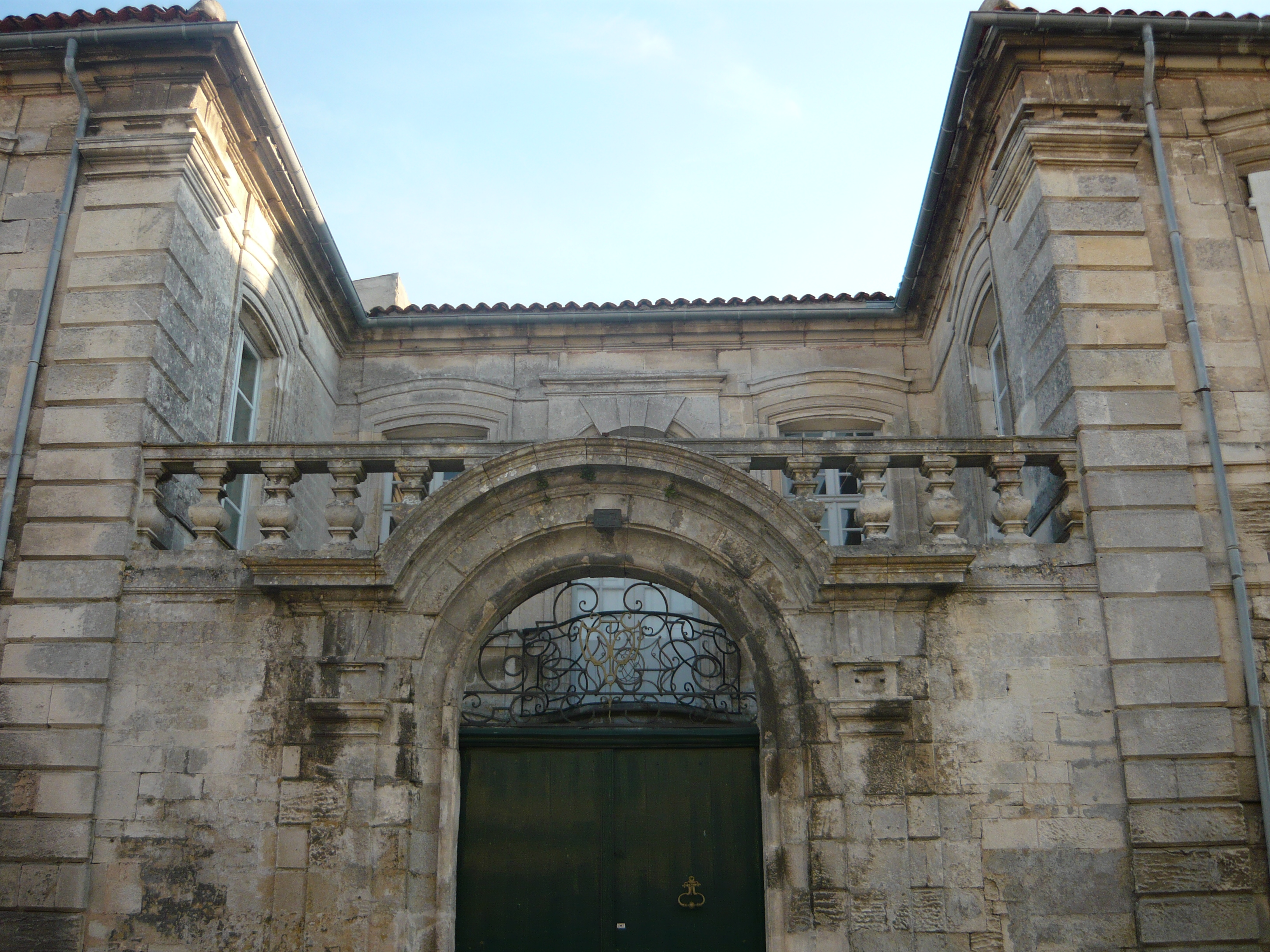 Portail d'entrée d'un immeuble d'époque classique à Marennes (17).